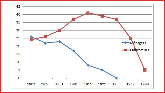 Diagramme de l'évolution des nombres de cultivateurs et de ménagers à Querrieu de 1802 à 1998.